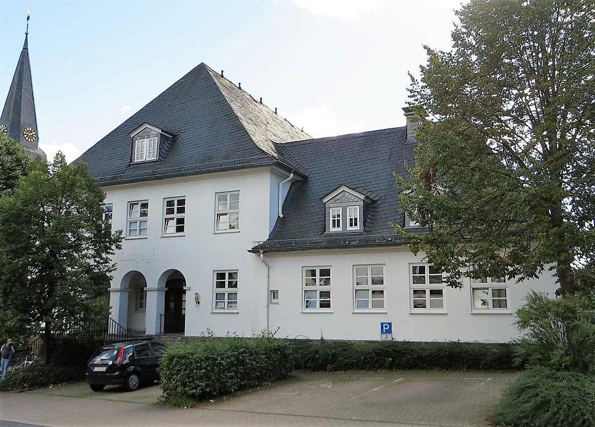 Denkmalgeschütztes ehemaliges Amtsgerichtsgebäude in Attendorn, Hohler Weg 1. Das Amtsgericht Attendorn wurde 1979 aufgelöst; zuständig war danach das Amtsgericht Olpe. This is a photograph of an architectural monument.It is on the list of cultural monuments of Attendorn